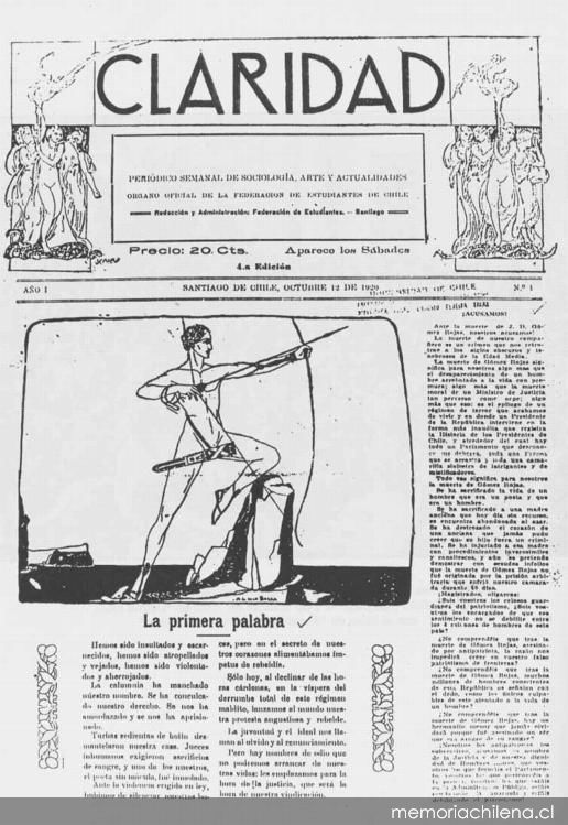 Primer número de la revista Claridad de la Federación de Estudiantes de la Universidad de Chile